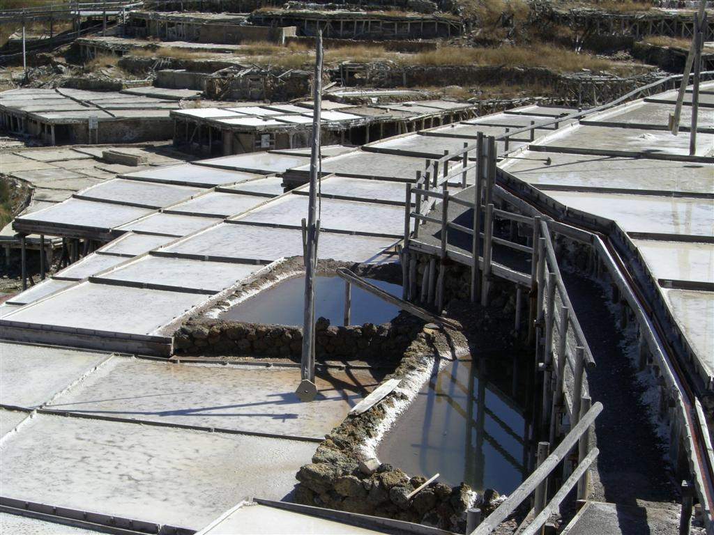 Pozos donde se almacena la salmuera